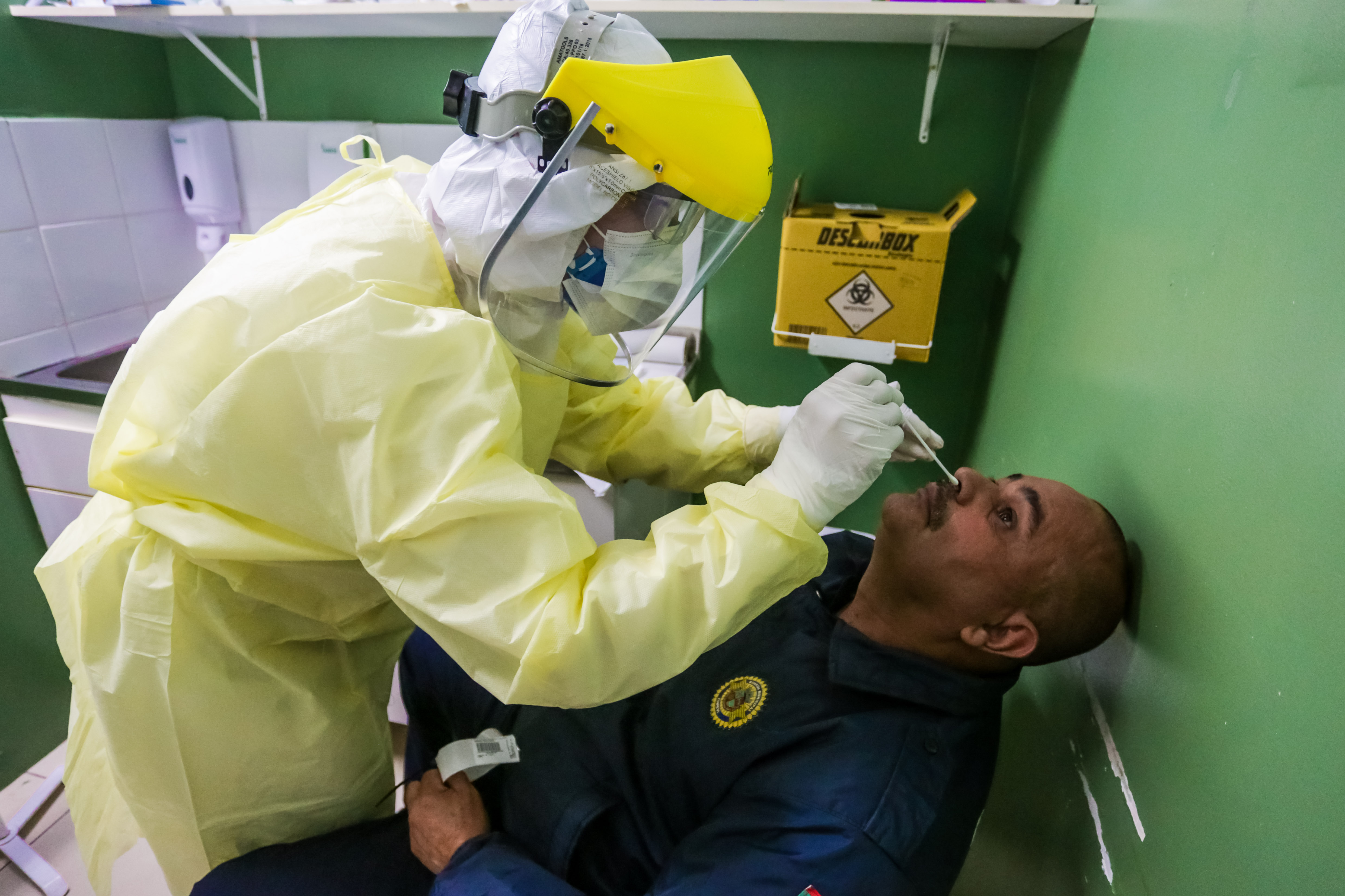 Foto: Willian Leite/PMI